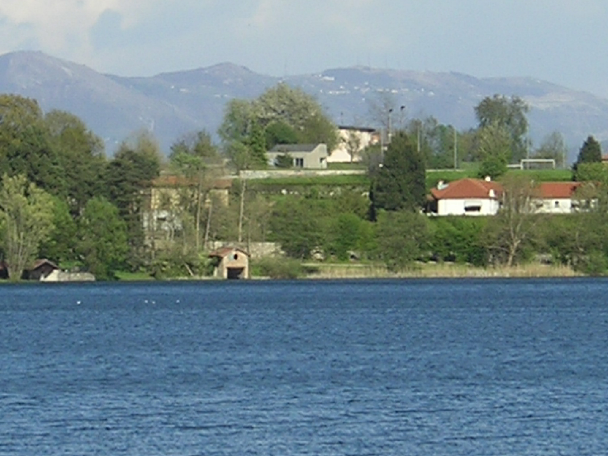 Lago di Montorfano in Italia (provincia di Como); autore Massimo Macconi, aprile 2004